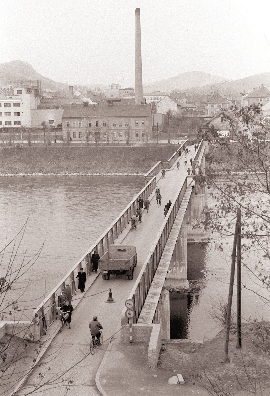 Most čez Dravo v Melju